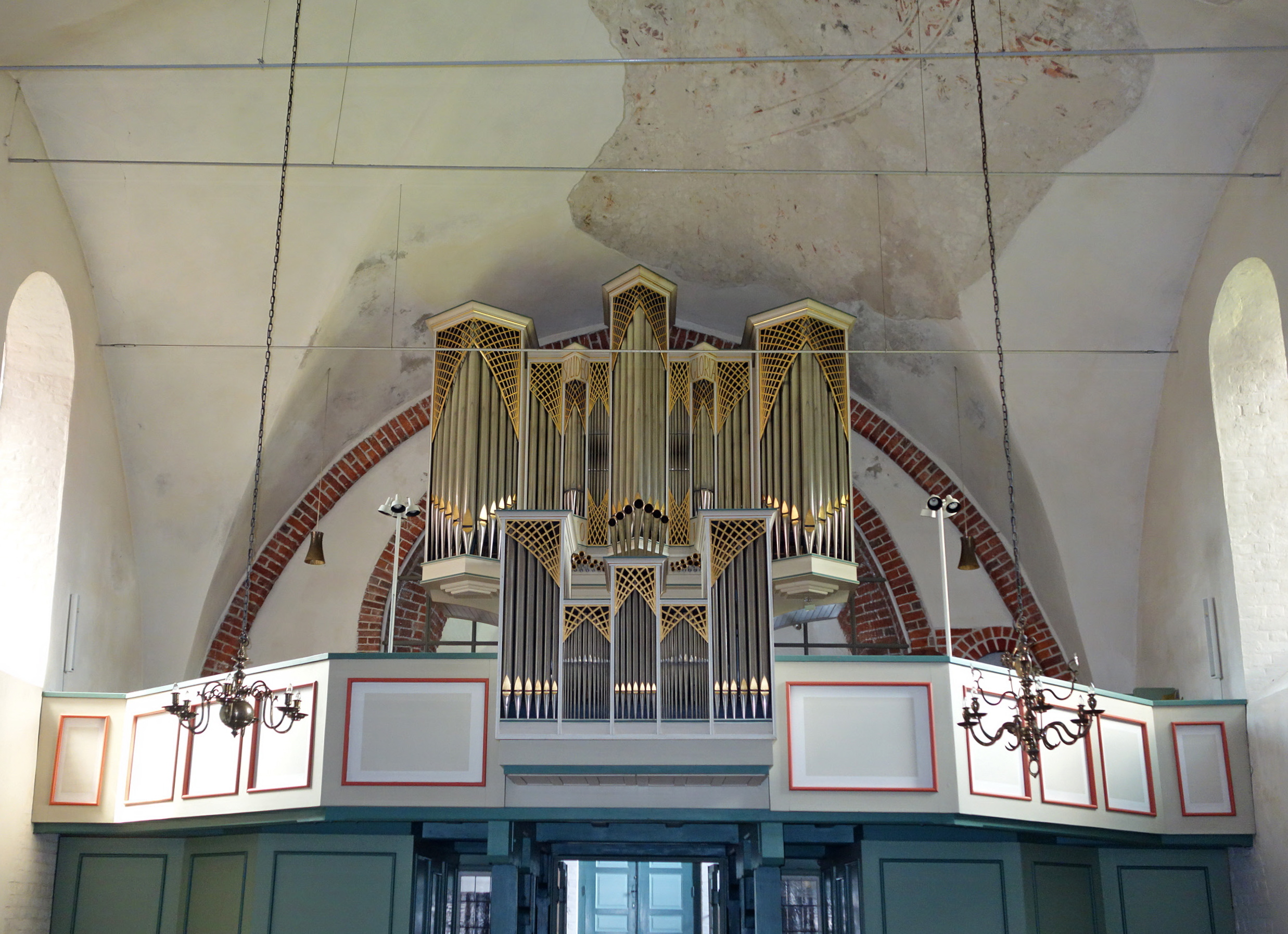 Orgel der St.-Michaeliskirche, Lütjenburg, Schleswig-Holstein